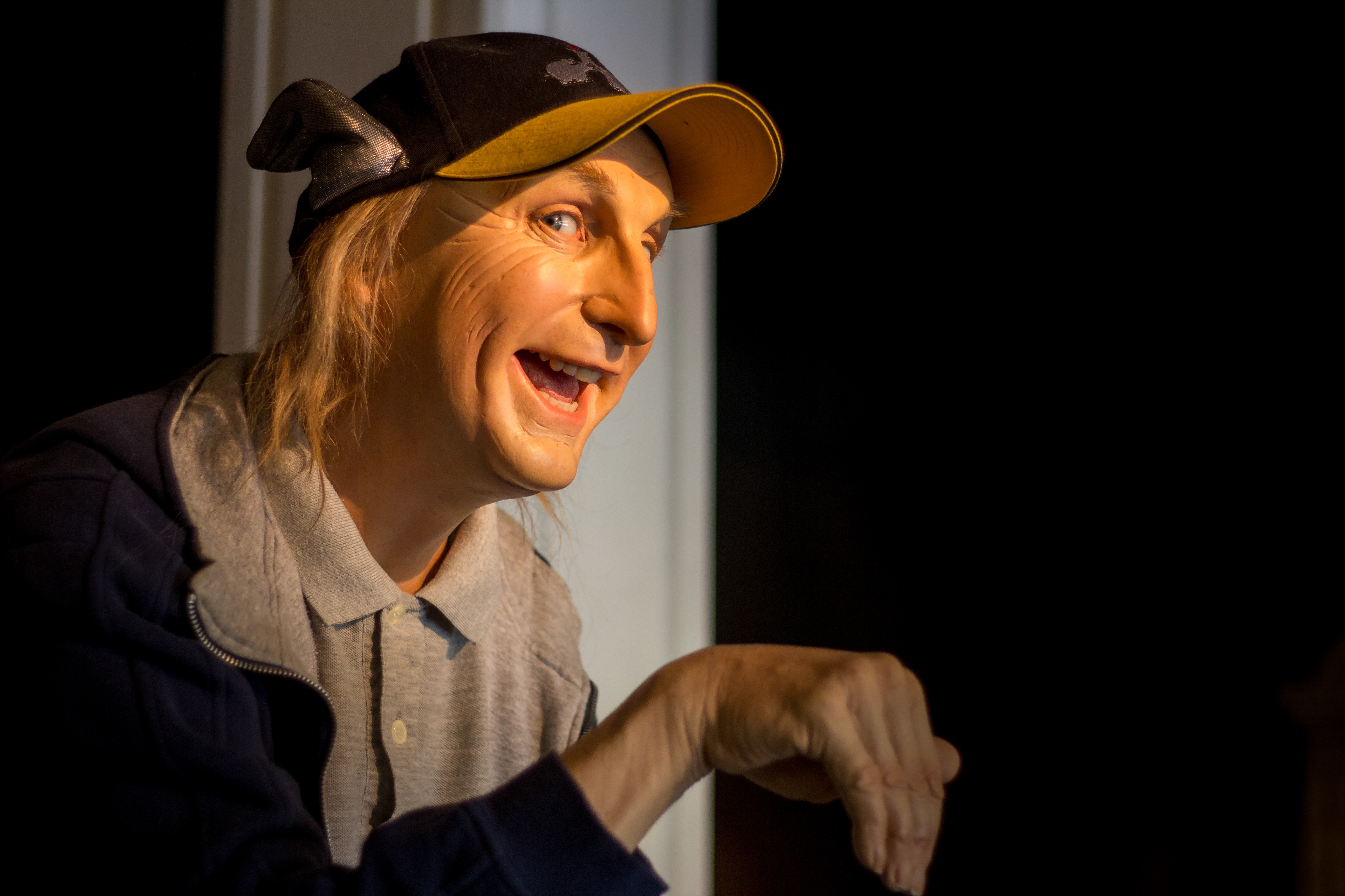 Wax Figure Otto Waalkes, Panoptikum Hamburg